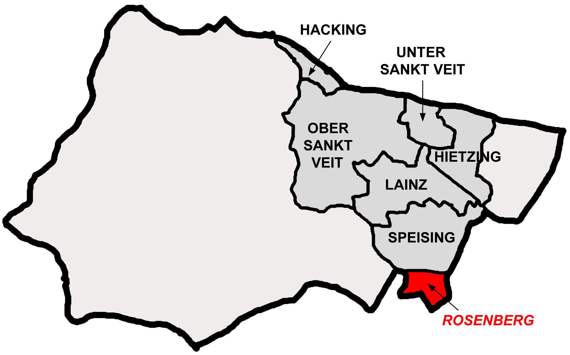 Positionskarte der Katastralgemeinde Rosenberg im Wiener Gemeindebezirk Hietzing